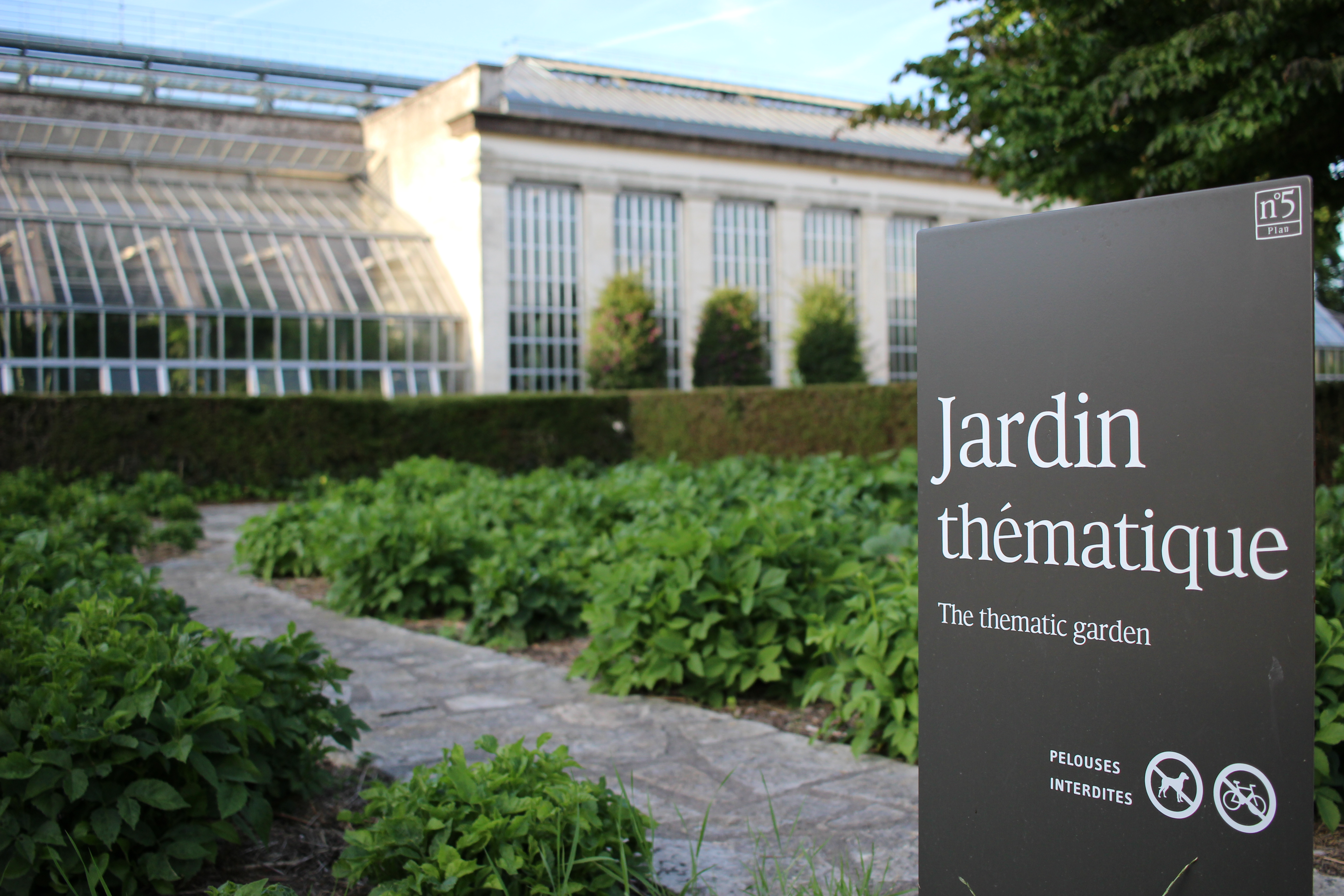 panneau dans un jardin thématique à l'entrée des serres du jardin botanique de Tours (France). A l'arrière, les serres du jardin botanique de Tours.